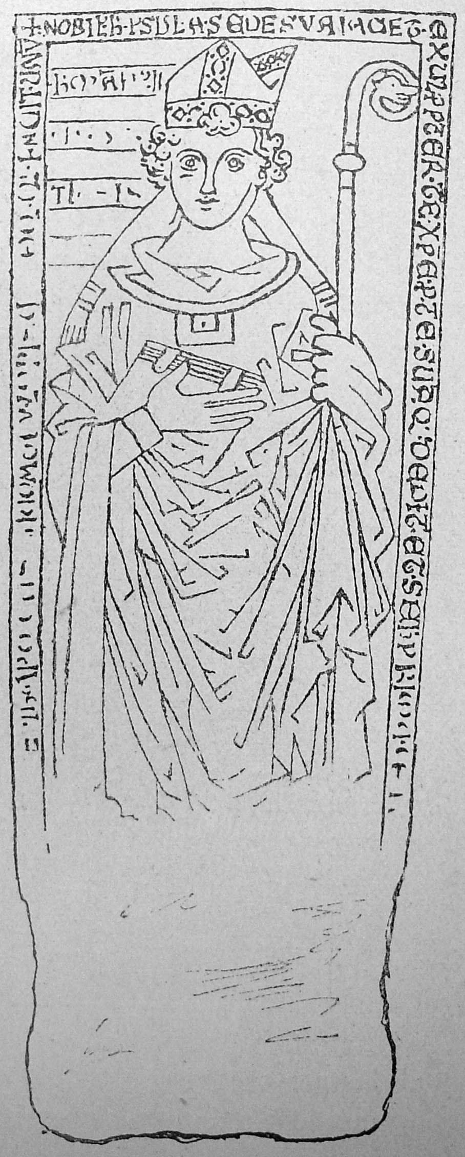 Grabstein von Hermann II. von Katzenelnbogen im Kloster Marienfeld